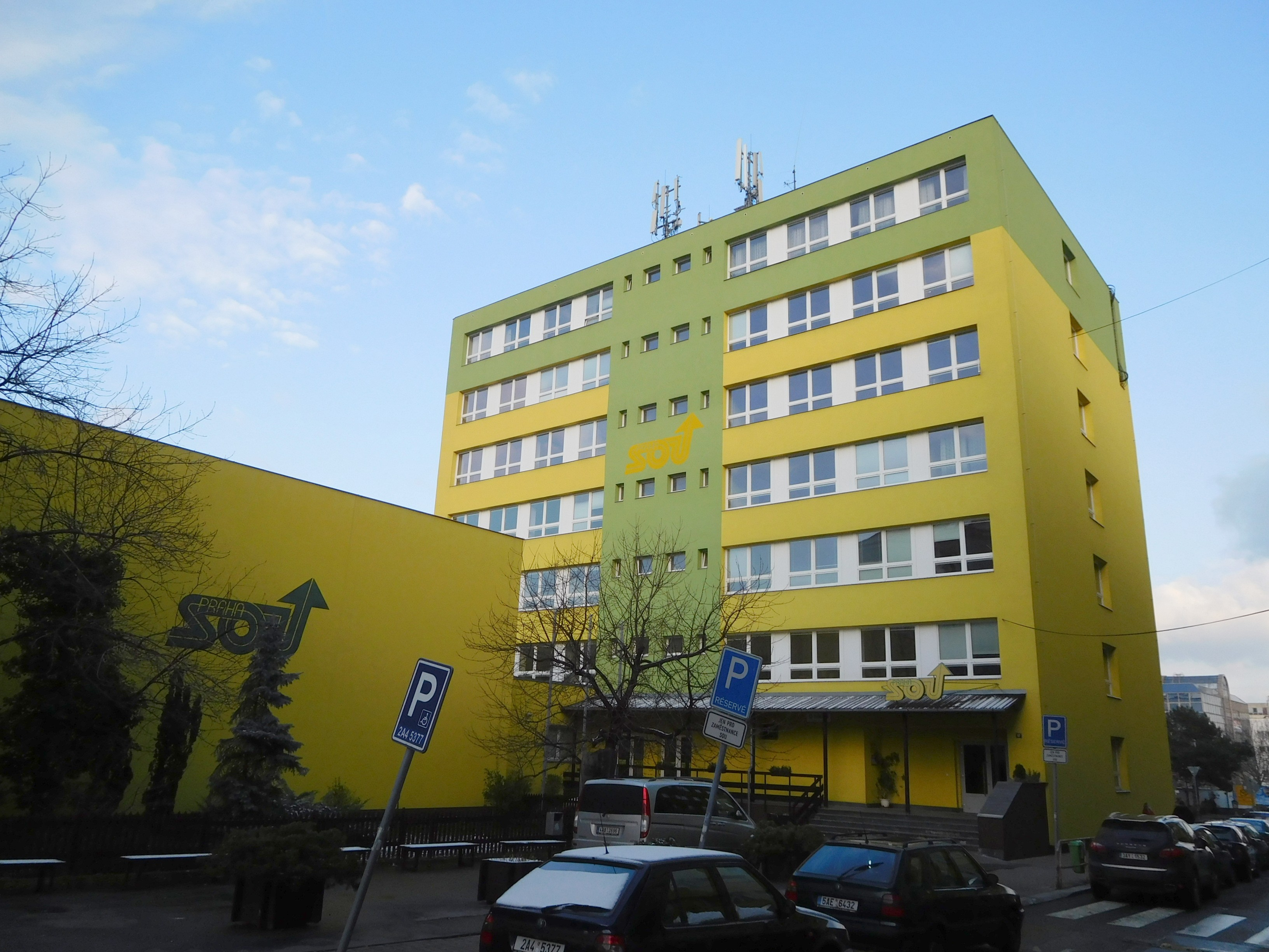 Praha - Michle - Ohradní 57, SOU Ohradní